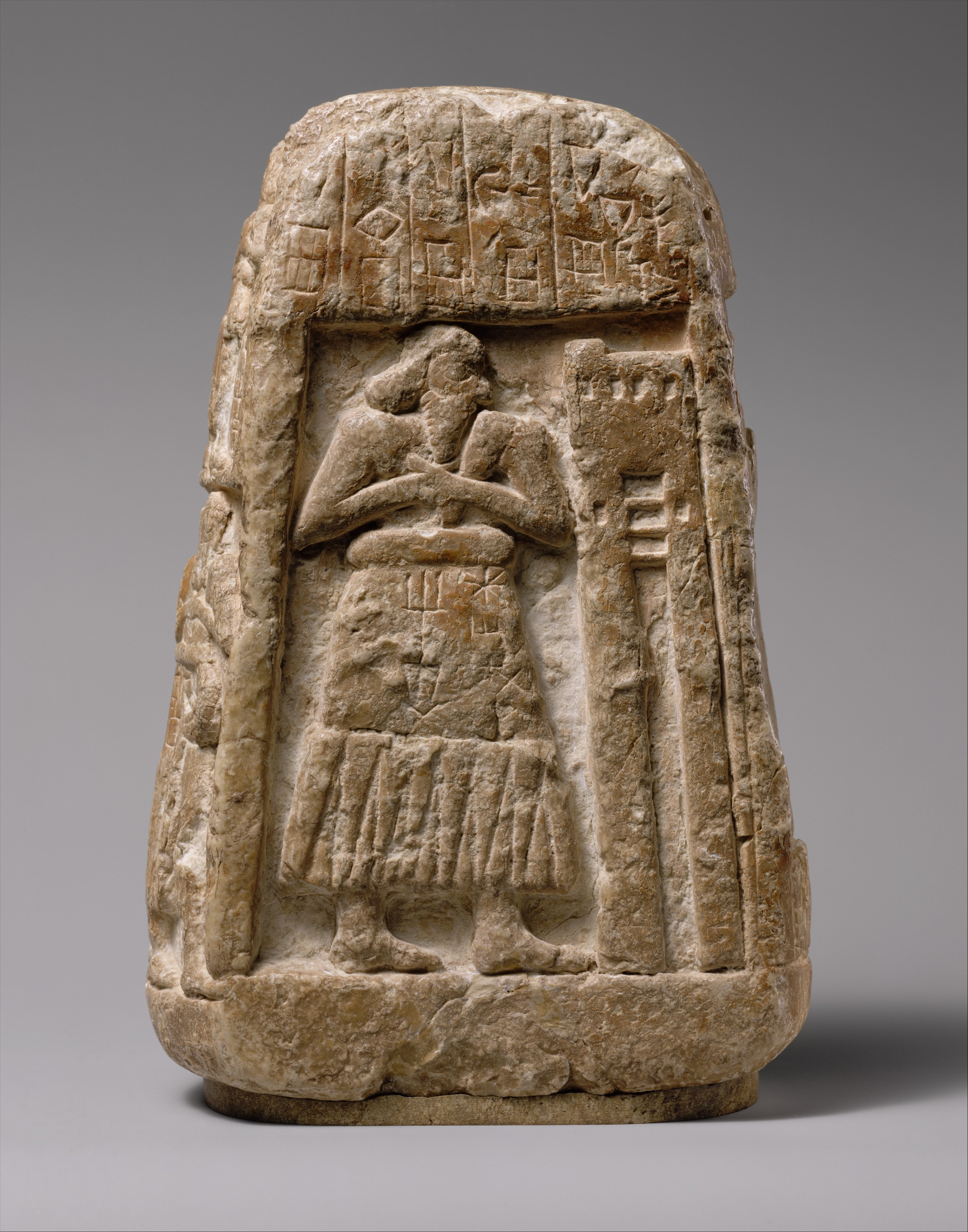 Sumerian; Relief; Stone-Reliefs-Inscribed